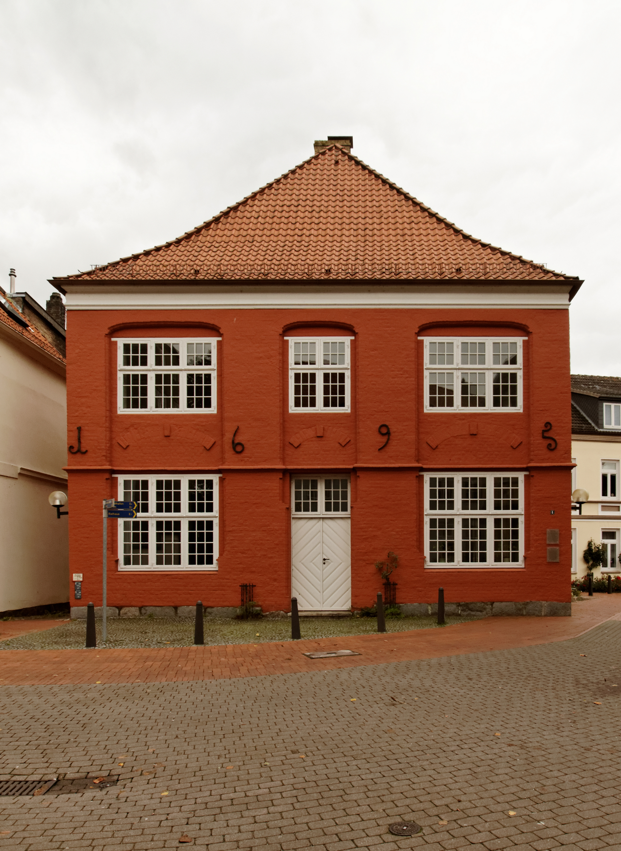 Schleswig, Langestr. 6